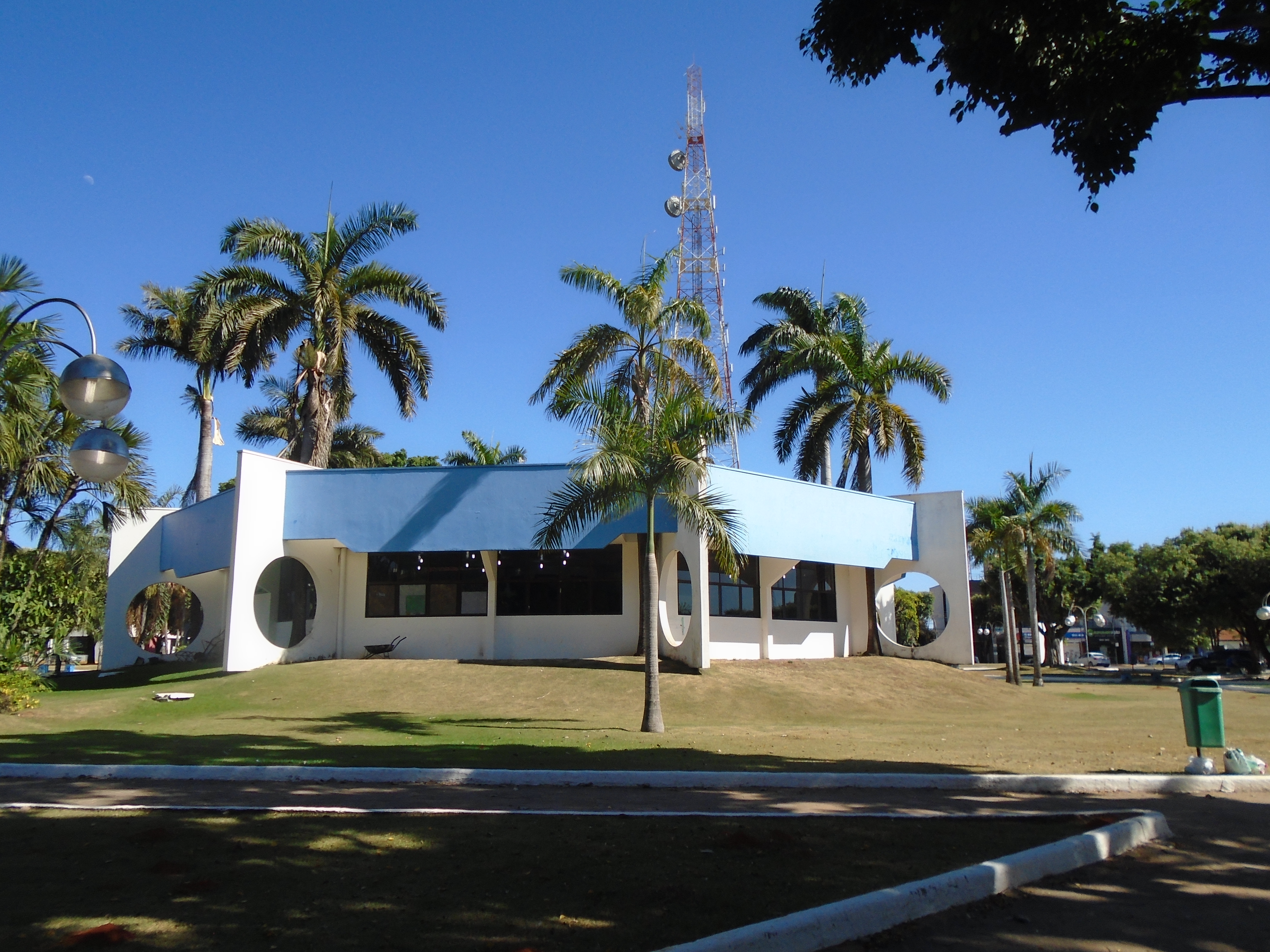 Biblioteca Pública Municipal Monteiro Lobato (Sorriso, Brasil)